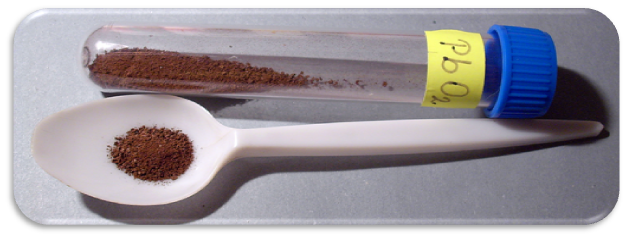 Oxid olovičitý - PbO2